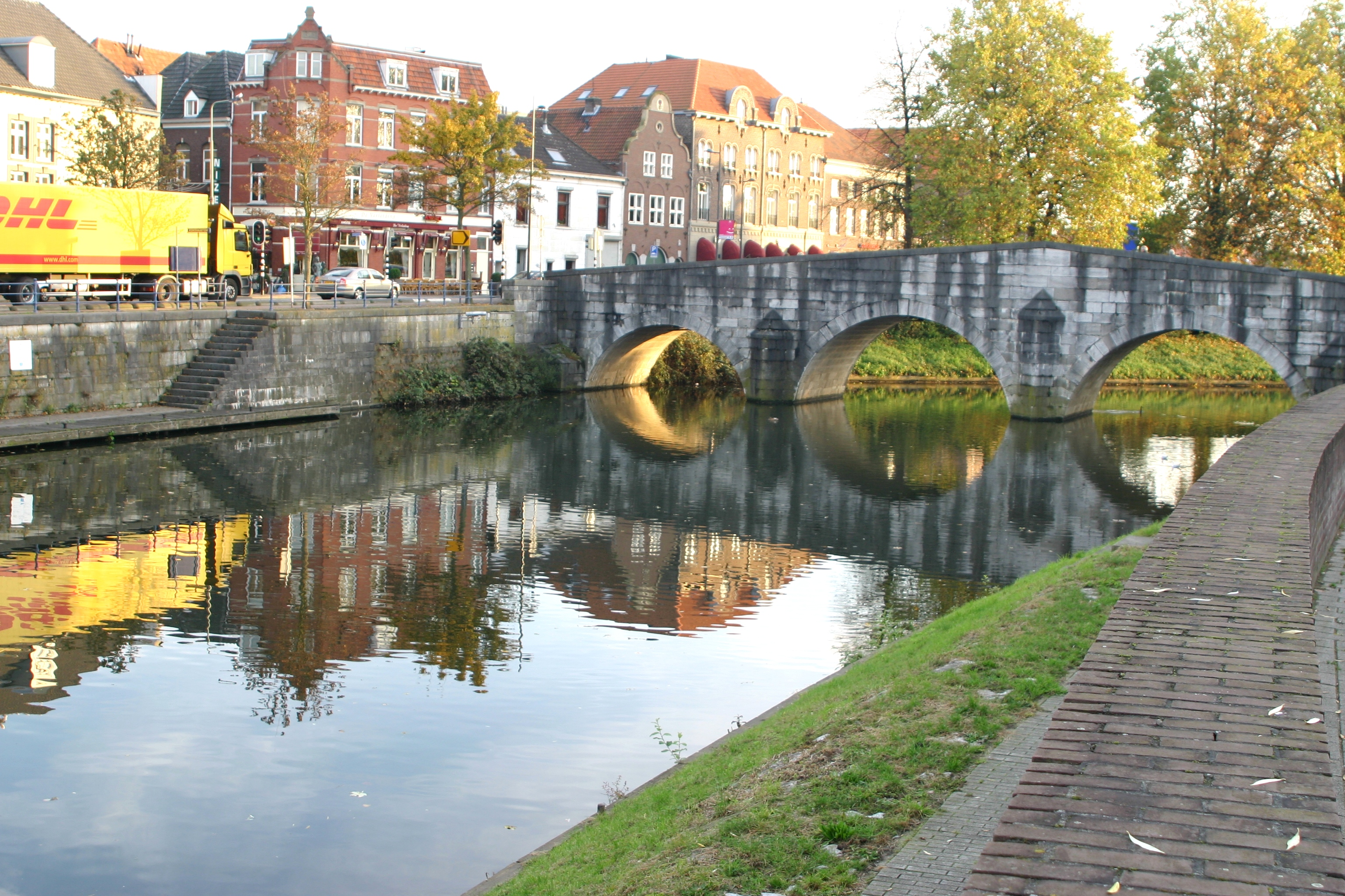 D'Roer zu Roermond vum Fëschmaart flossop gekuckt.